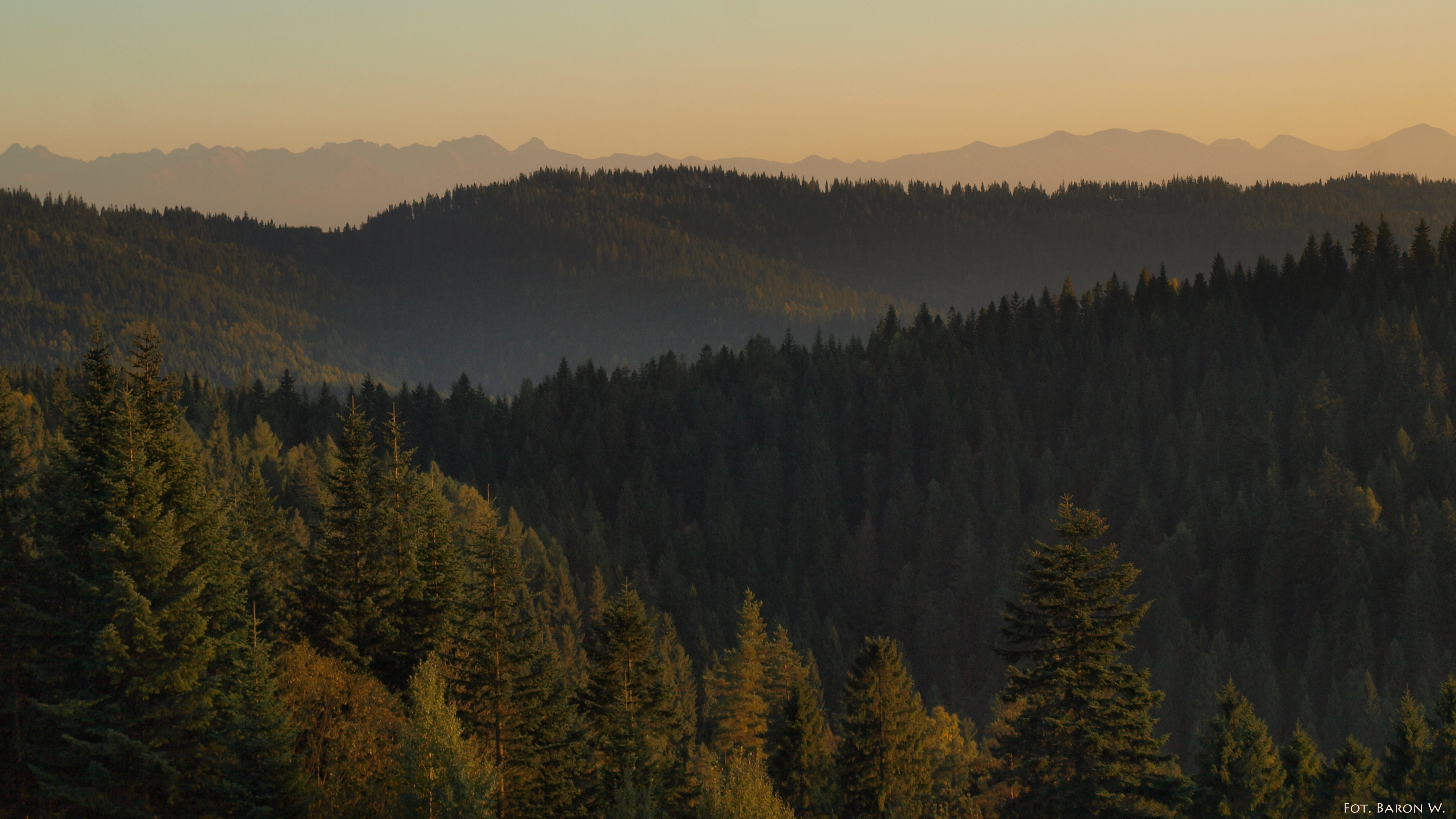 Staro Karpacka Puszcza w Gorcach, na horyzoncie widać Tatry